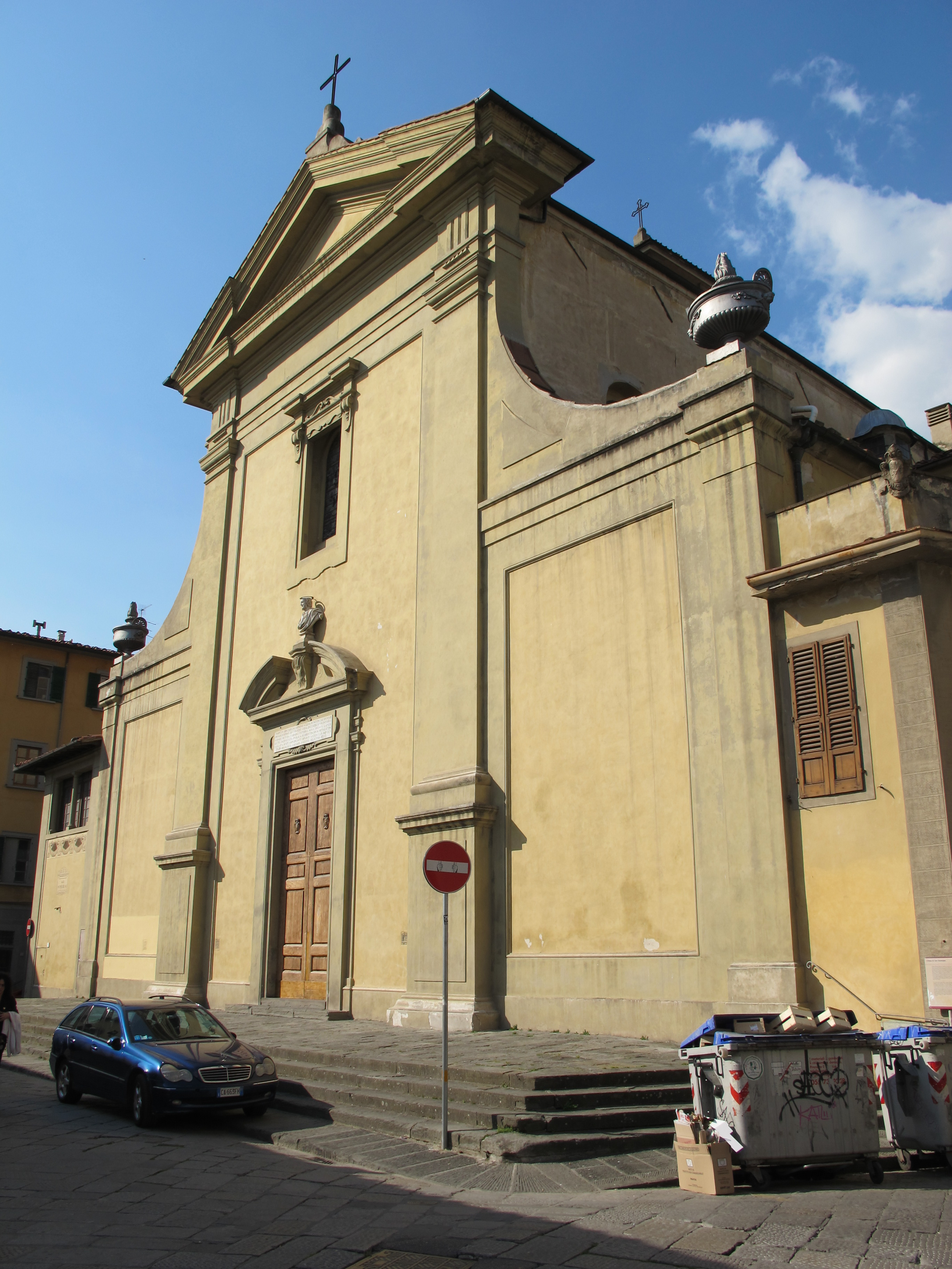 San giuseppe, firenze, facciata